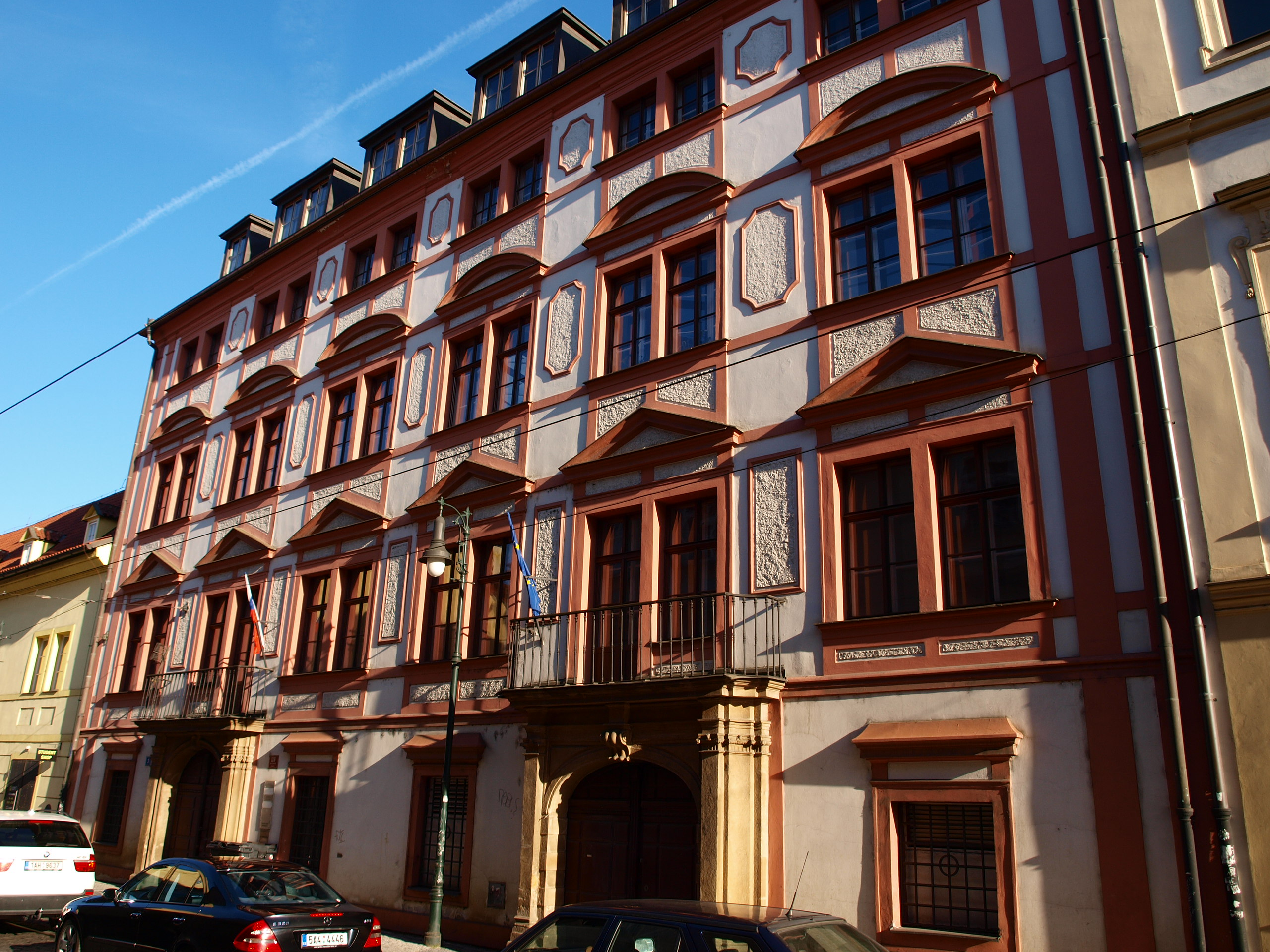 Windischgrätzovský palác, Letenská